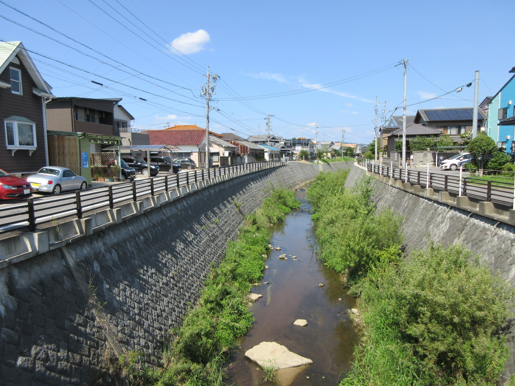 伊賀川（岡崎市元能見町、柿田町）